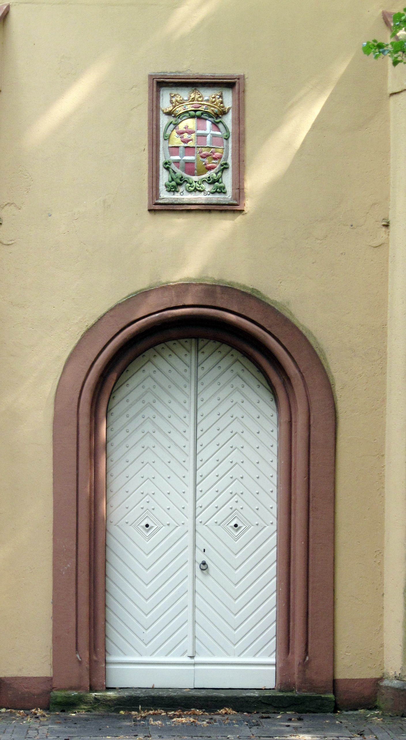 Werl, Kapelle auf der Gänsevöhde, Rundbogenportal mit Wappen